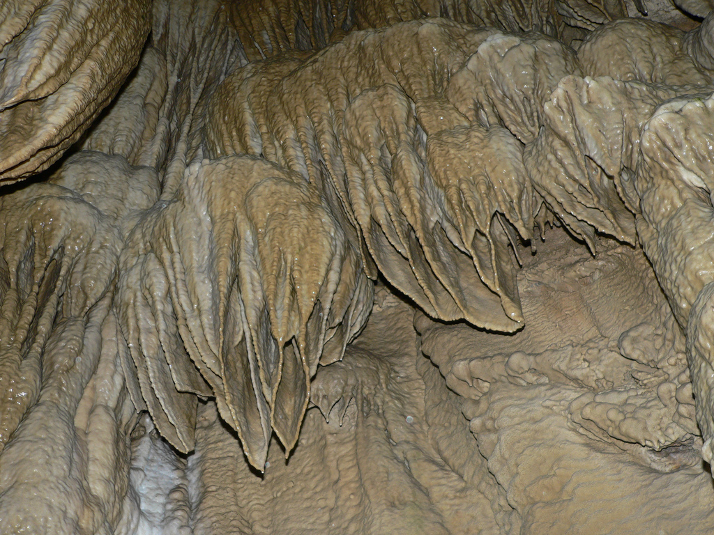 Oregon Caves